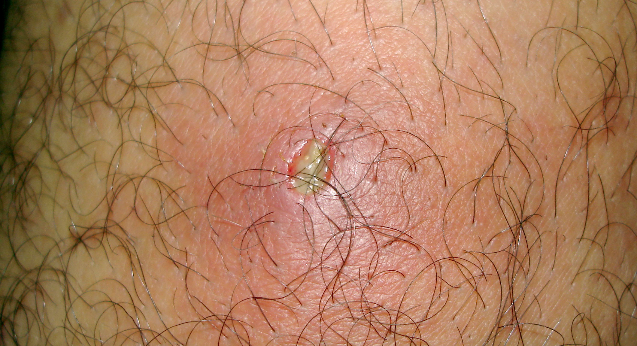 Exemple de furoncle